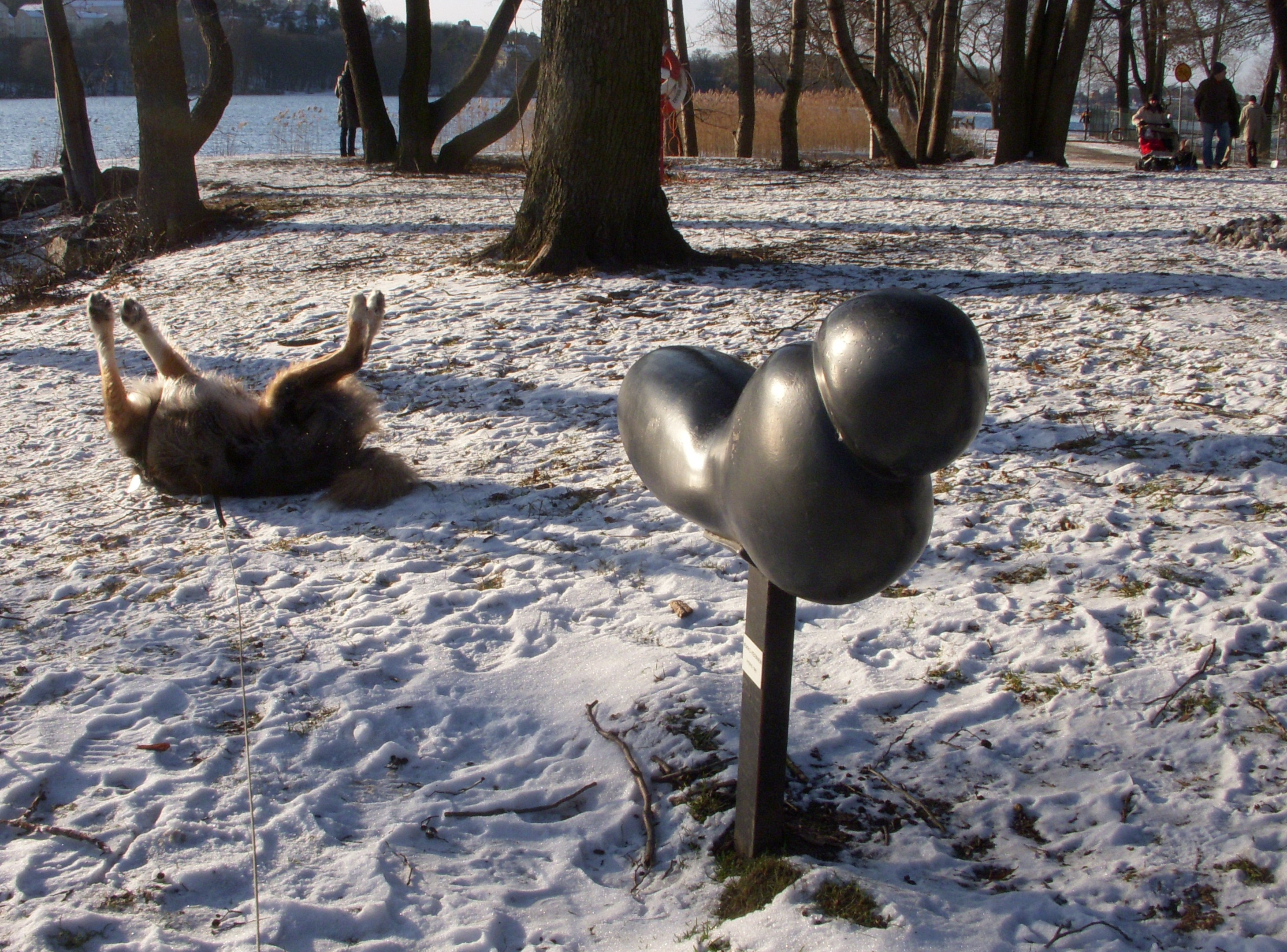 Veikko Keränen "Hybrid", Huvudsta